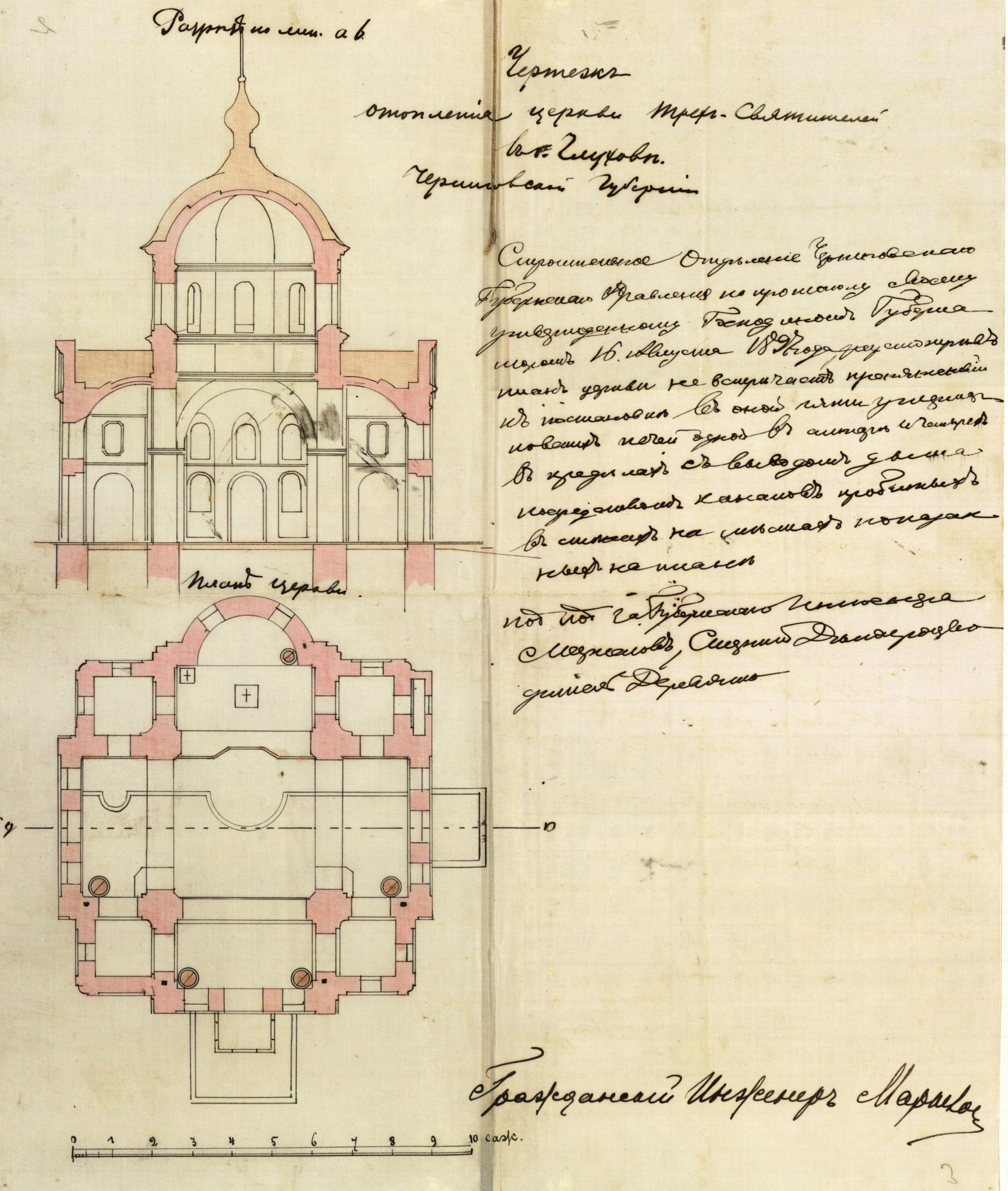 Схема Трьохсвятської церкви